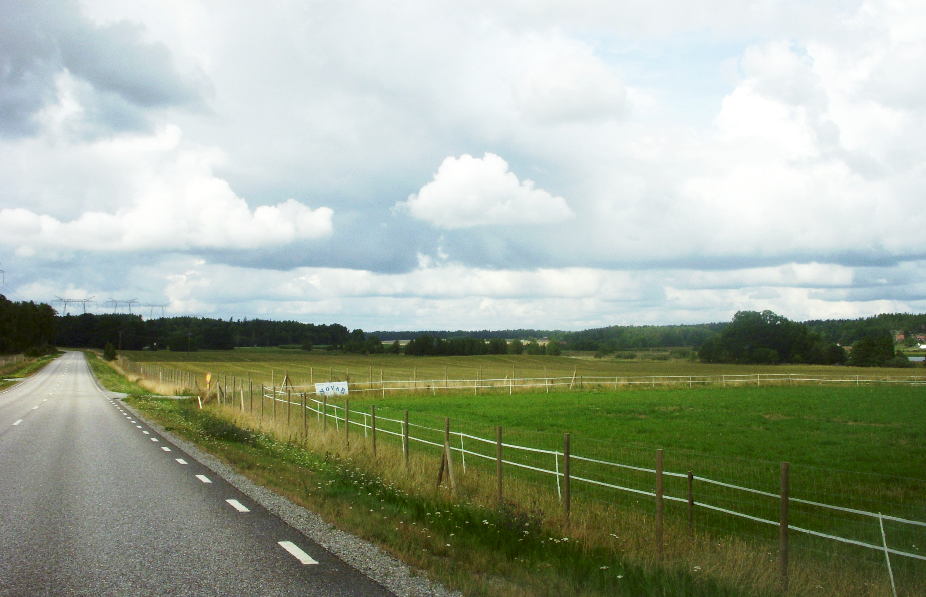 Ekerövägen mellan Ekerön och Munsön i Ekerö kommun